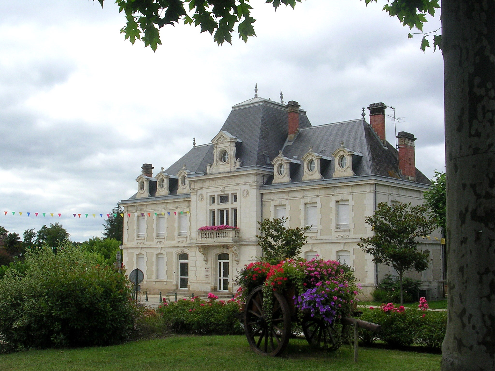 Mairie de Labrit, dans les Landes (France)